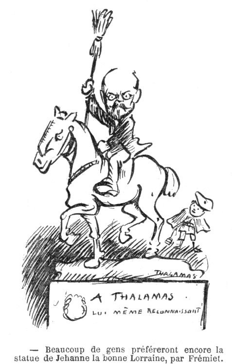 Caricature de Thalamas (détail), Le Rire, n° 97, 10 décembre 1904.